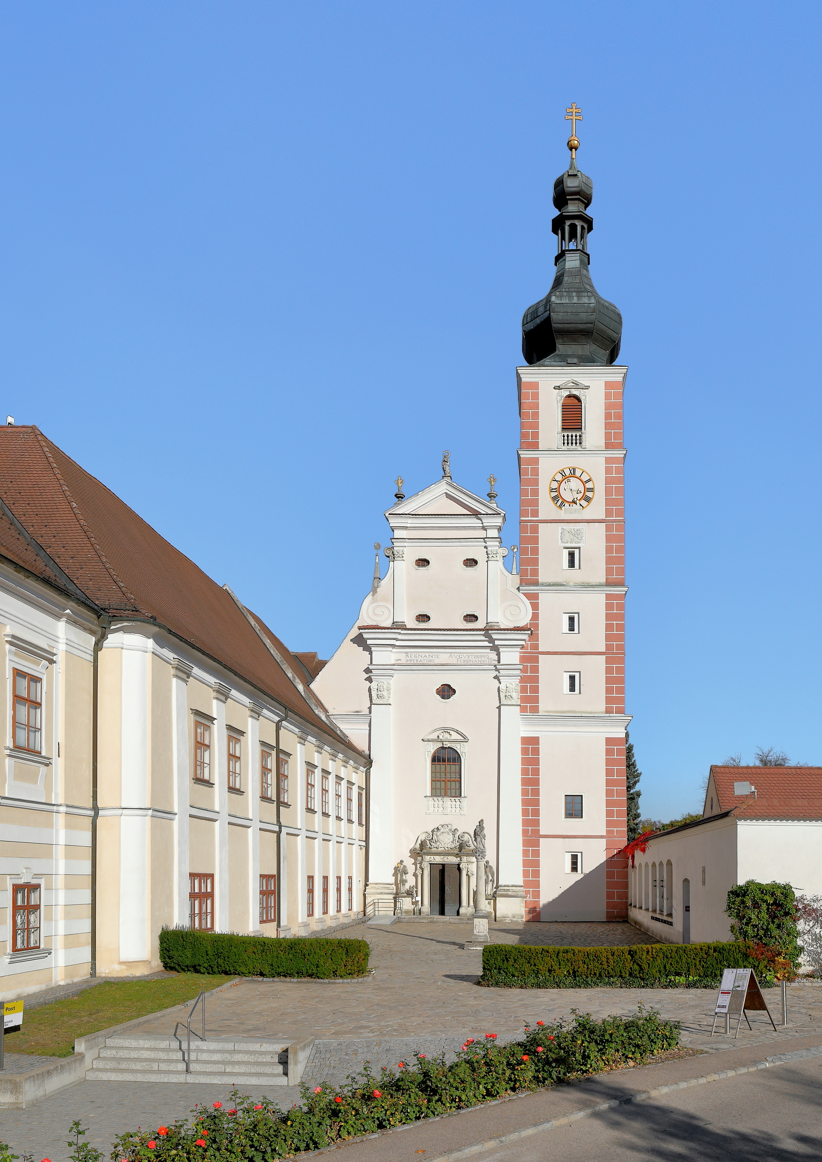 Die Stifts- und Pfarrkirche Mariä Geburt in der niederösterreichischen Stadt Geras und links der Südflügel der Prälatur. Die Kirche, ein dreischiffiger Sakralbau mit einer romanischen Kernsubstanz, wude nach einem Brand 1643 barockisiert. Der Turm wurde 1663 errichtet und 1672 der Zwiebelhelm aufgesetzt. Die Mariensäule davor ist mit 1653 datiert. Im Jahr 1953 wurde die Kirche zur „Basilika minor“ erhoben. Die Errichtung der Prälatur, eine dreiflügelige Anlage, die westseitig an den Konventtrakt angebaut ist, erfolgte nach der Mitte des 17. Jahrhunderts.